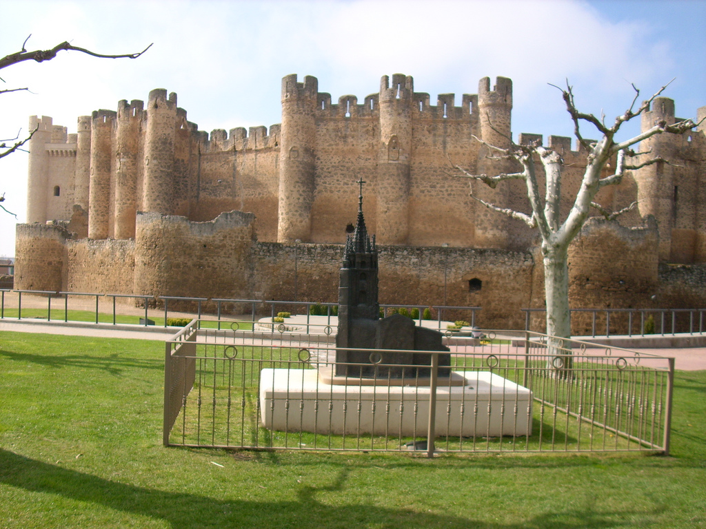 Castillo de Coyanza, León, País Leonés.